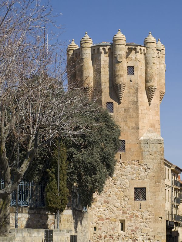 Torre del Clavero